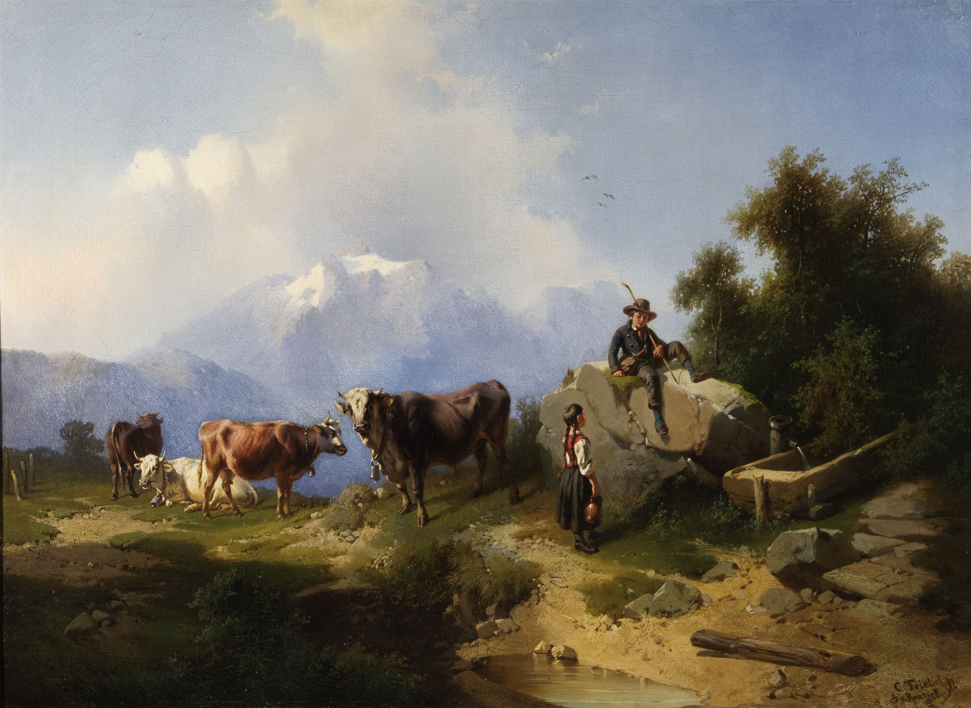 Von Kindern gehütetes Almvieh im Hochgebirge. Öl auf Leinwand, Rechts unten signiert C. Triebel mit Zusatzbezeichnung A. v. Rentzell. 69 x 94 cm Dessau 1823 - 1885 Wernigerode/Harz